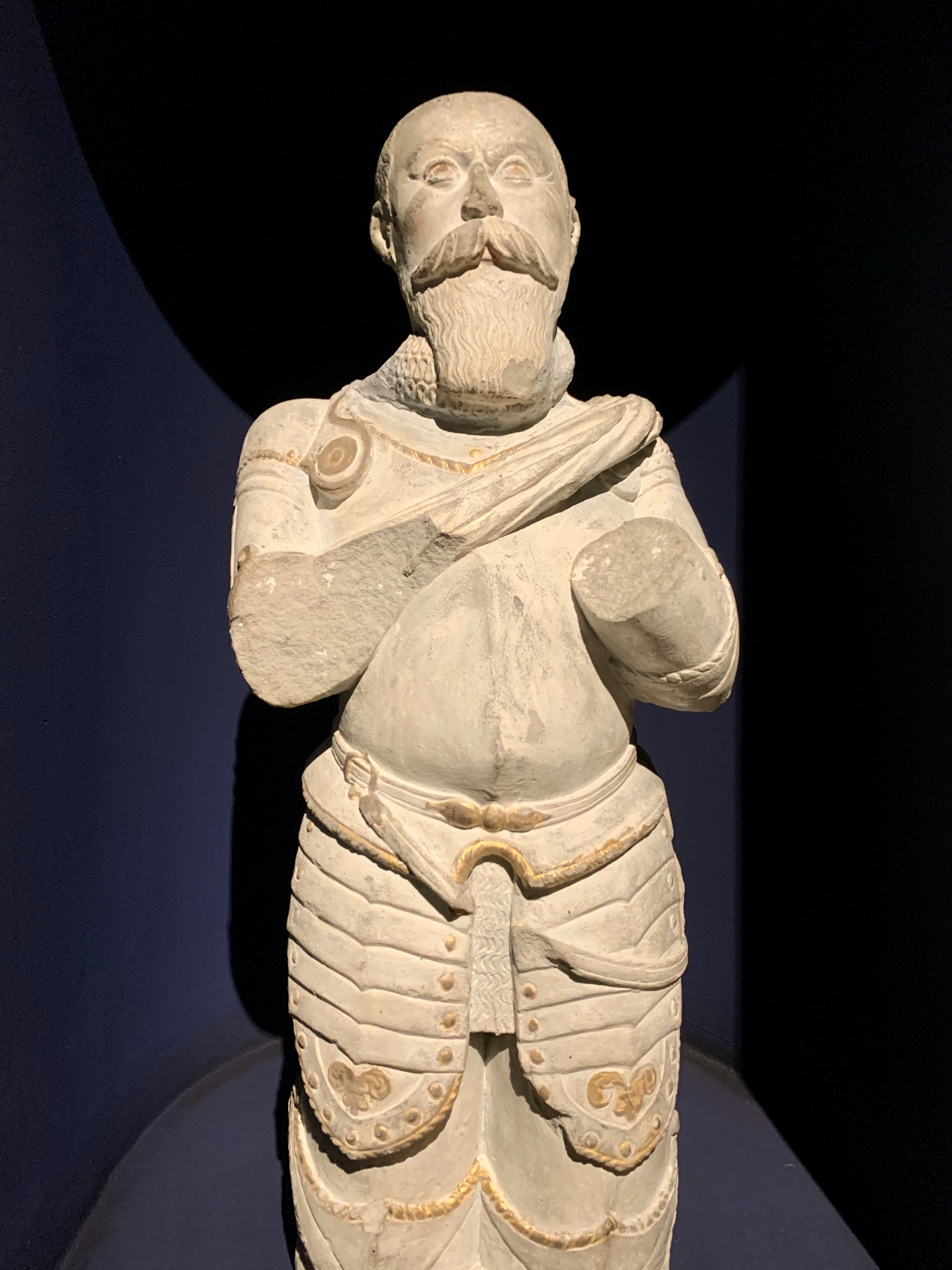 Sandstensfigur af Jørgen Kaas fra epitafium i Glæsborg Kirke